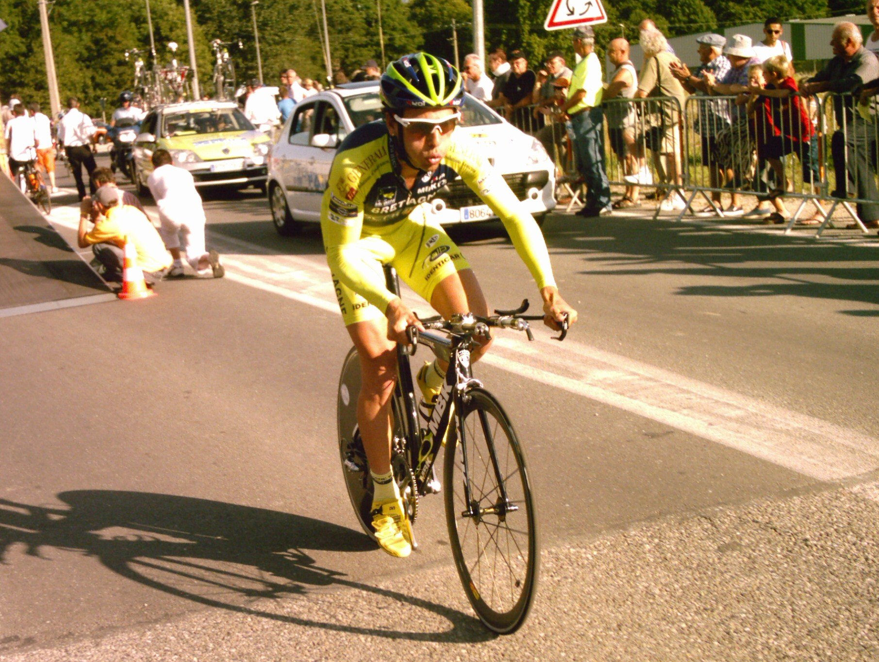 Yann Pivois au départ du contre-la-montre de la troisième étape b du Tour de l'Ain 2009